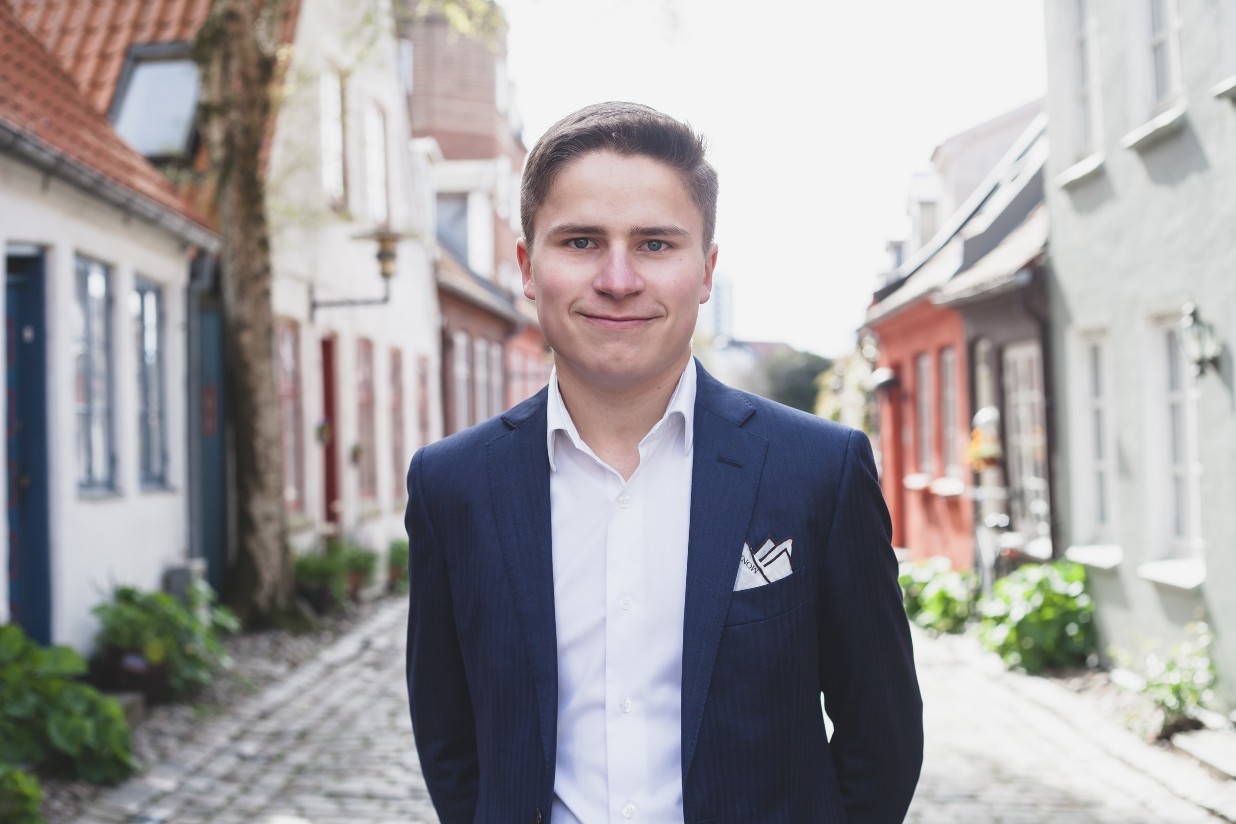 Billede af Jakob Sabroe, landsformand for VU.